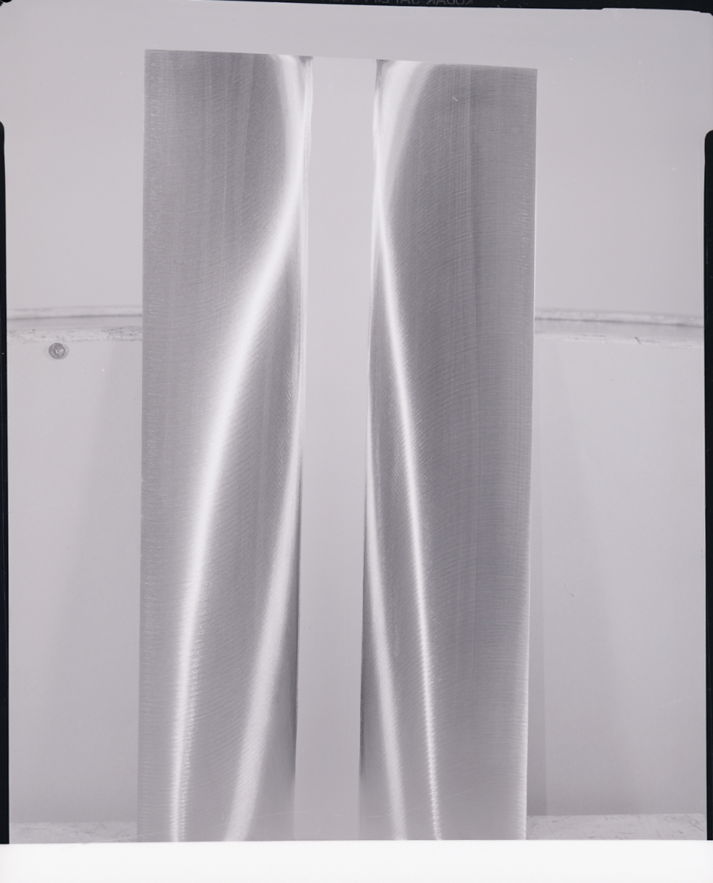 Servizio fotografico : Italia, 1963 / Paolo Monti. - Buste: 12, Fototipi: 12 : Negativo b/n, gelatina bromuro d'argento/ pellicola ; 10x12. - ((Serie costituita da 12 buste sciolte di negativi identificati con una doppia numerazione (da 44975 a 44991): 24933, 24934, 24935, 24936, 24937, 24938, 24939, 24940, 24941, 24942, 24943, 24944. - La suddetta serie è contenuta nella scatola G24801-24500, formato 18x24, e identificata con la lettera "A", manoscritta a matita sul coperchio in basso a destra. - La doppia numerazione potrebbe corrispondere ai lavori realizzati durante il periodo di attività del laboratorio e studio fotografico "Foto Studio 22", società che risulta essere stata aperta il 10/04/1961, con partecipazione, nel ruolo di gerente, di Vincenzo Carrese. - Fonte: Rubrica di Paolo Monti: Archivio fino 1-4-1961/ 31-3-1963 (1961-1963), presso Archivio Paolo Monti